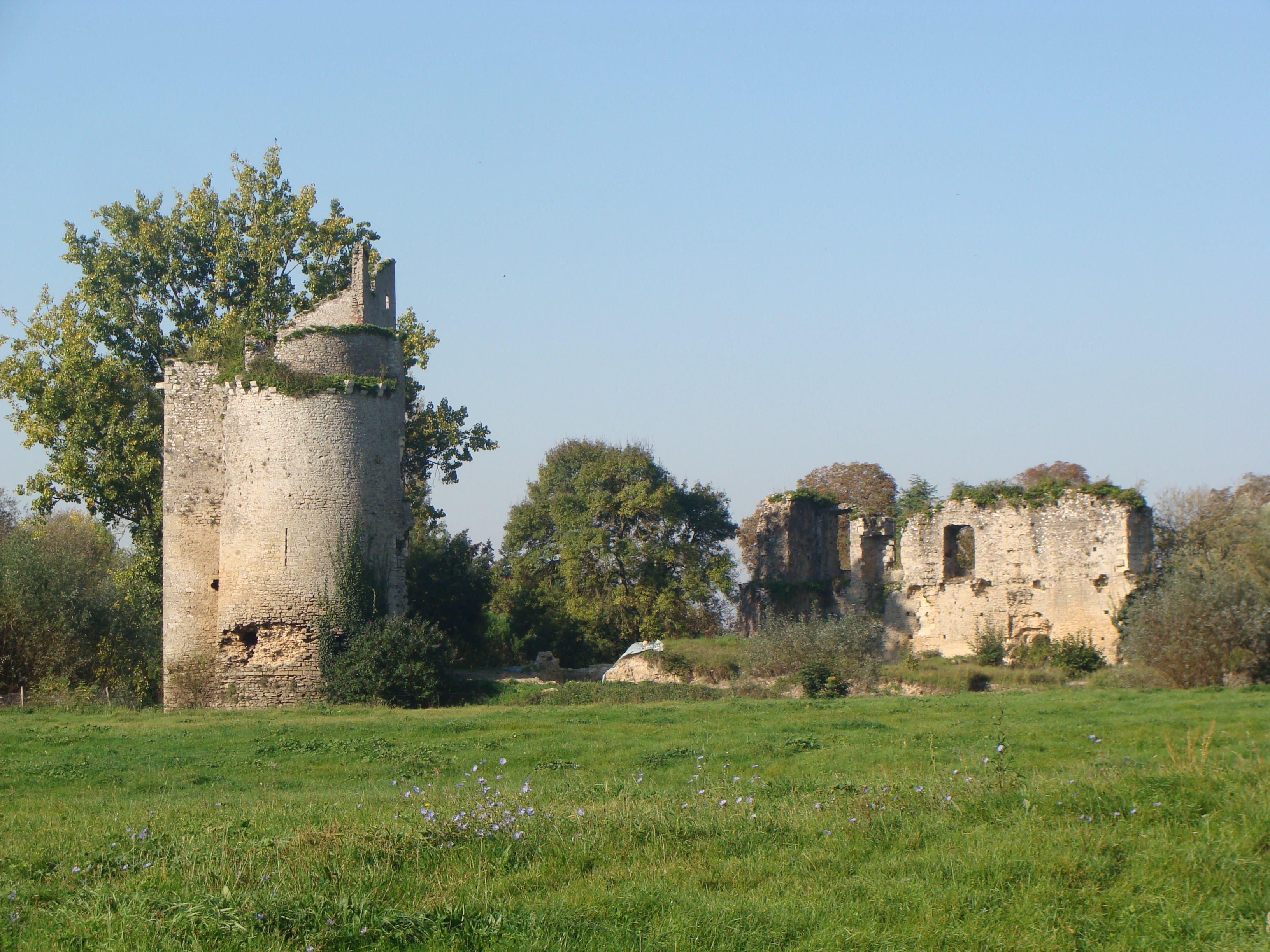 Château de Gilles de Retz - Machecoul, Loire-Atlantique